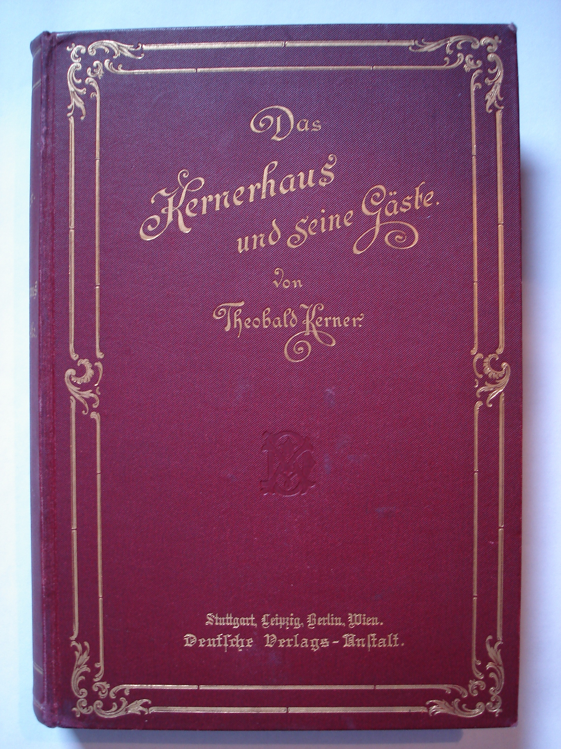 Erstausgabe von Theobald Kerners Erinnerungen an sein Vaterhaus, 1894 erschienen